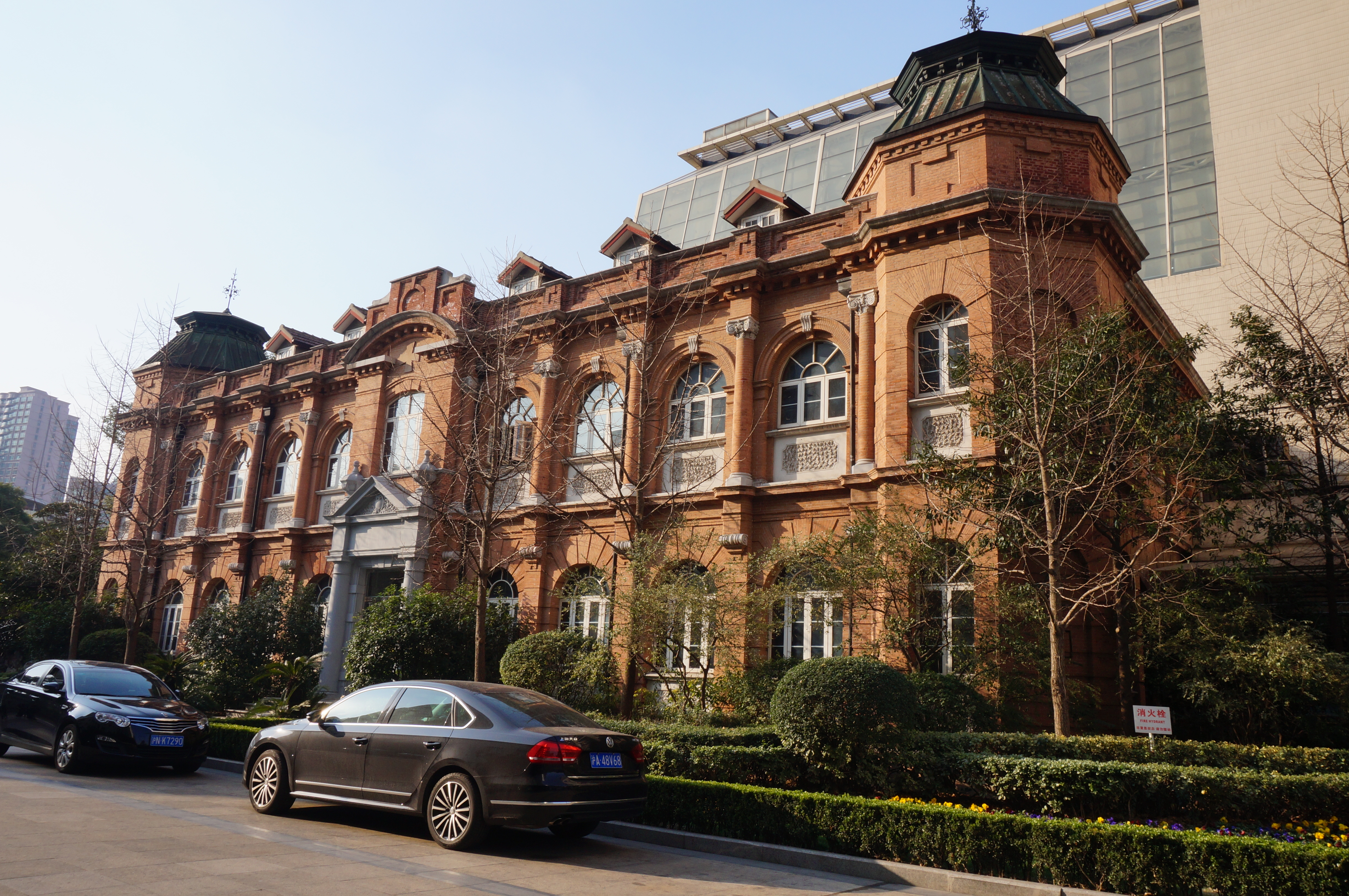 华山医院哈佛楼